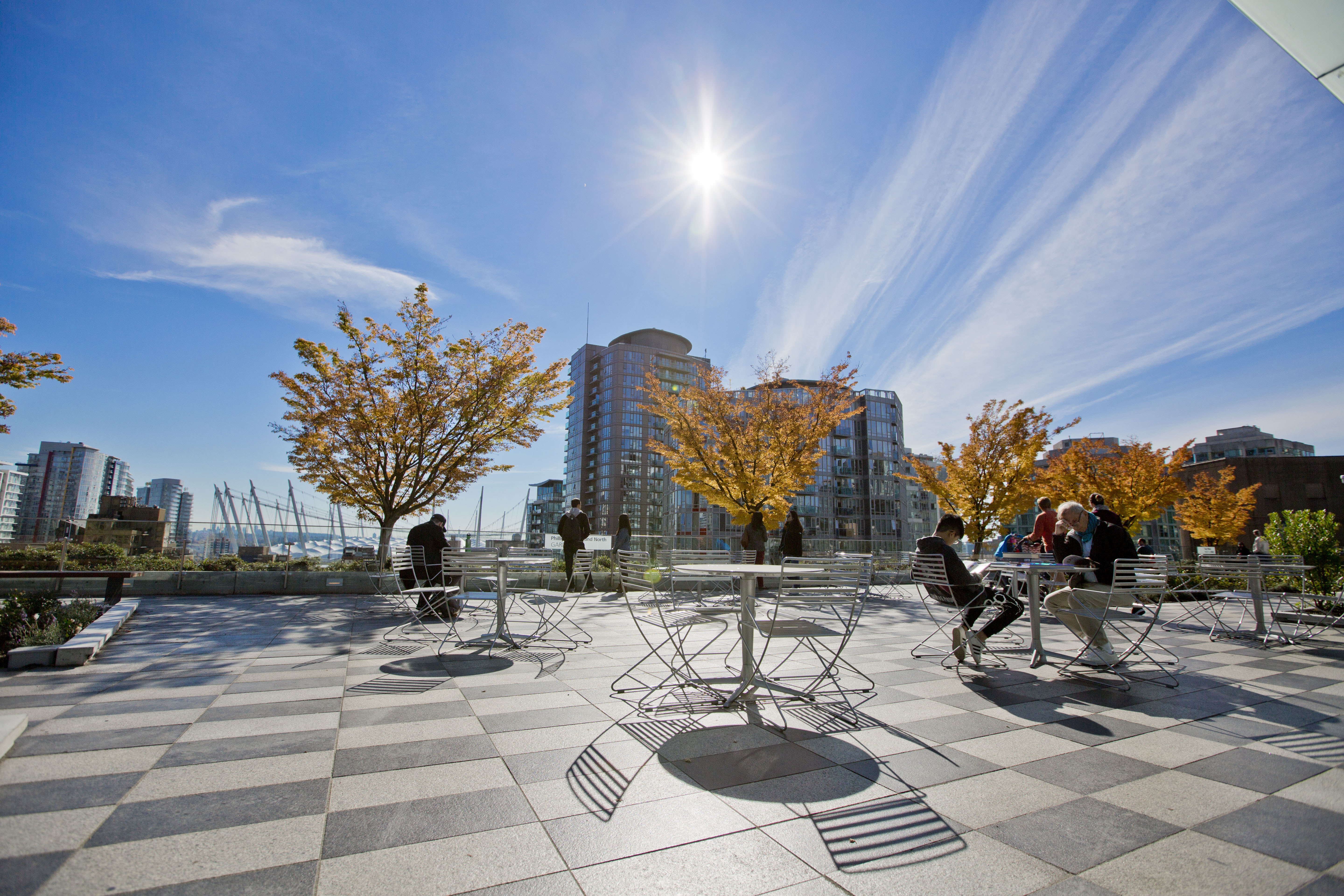 Vancouver Public Central Library